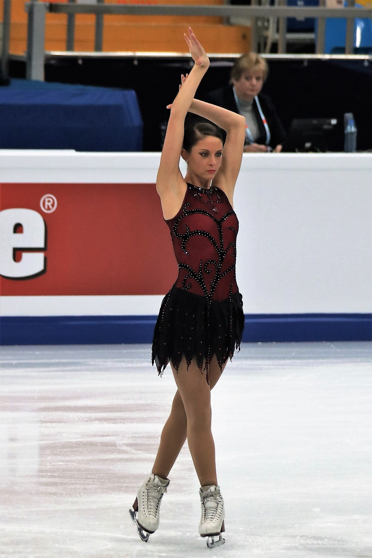 Наташа Маккей (Великобритания) на Чемпионате Европы по фигурному катанию 2018.